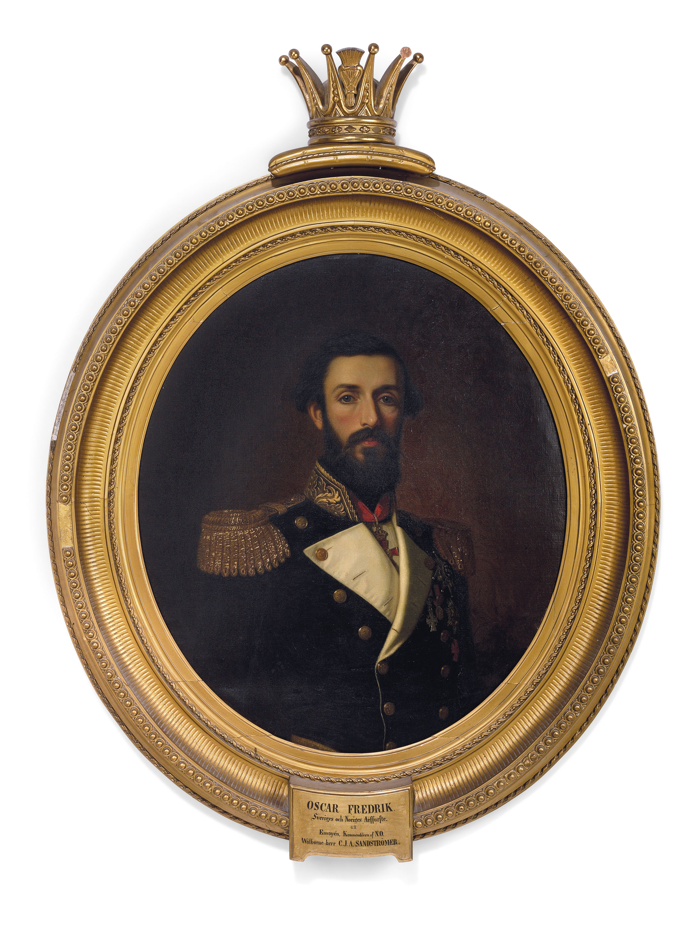 Porträtt av kronprins Oscar Fredrik, sedermera kung Oscar II. Prinsen bär flottans amiralsuniform, och runt halsen ser man Carl XIII:s ordens halskors. På bröstet bär han kraschan för Serafimerorden, Sankt Olavs orden samt Carl XIII:s orden. Bredvid kraschanerna syns Danneborgordens riddartecken, samt en okänd svensk medalj. Målning av okänd konstnär från ca 1865. Proveniens: Målningen skänktes av Oscar Fredrik till Carl Johan Albert Sandströmer (1832-1869).